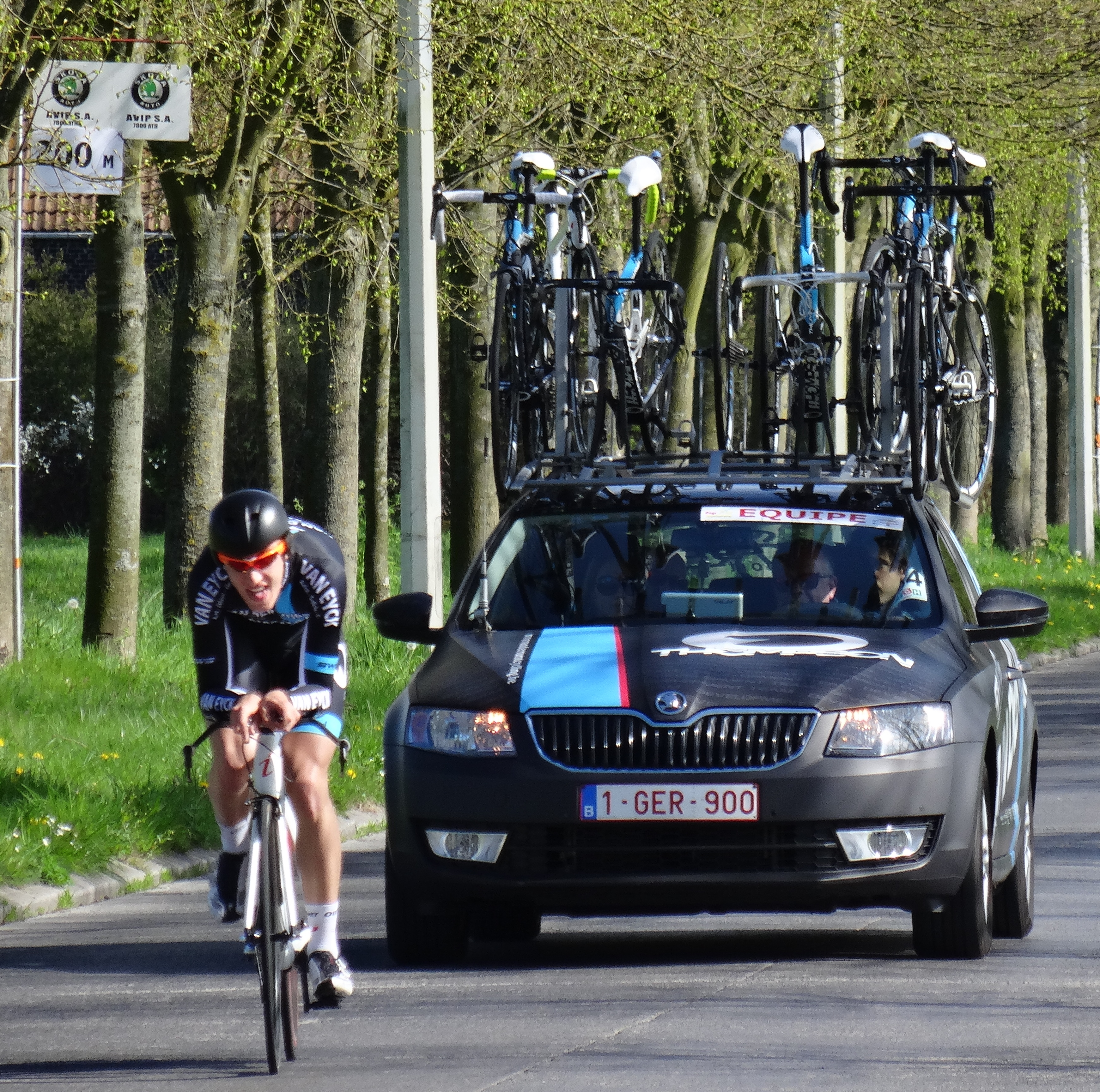 Triptyque des Monts et Châteaux 2014, étape 2a, 5 avril 2014, contre-la-montre individuel à Bernissart. Depicted team: Van Der Vurst Development The creation of these files was made possible thanks to the organizers of the Triptyque des Monts et Châteaux 2014 English | français | +/−